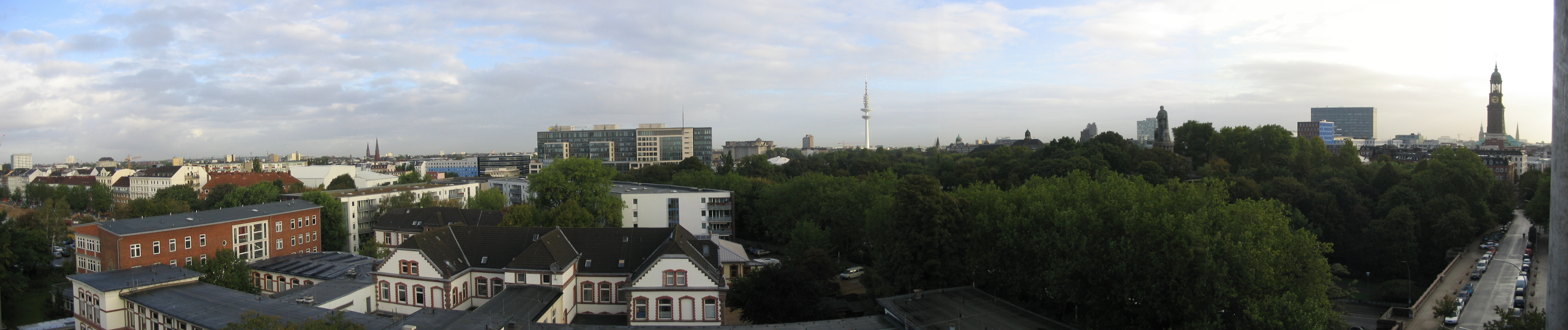 Hamburg, St. Pauli Panorama eigene Aufnahme Benutzer:AlterVista September 2004 GFDL